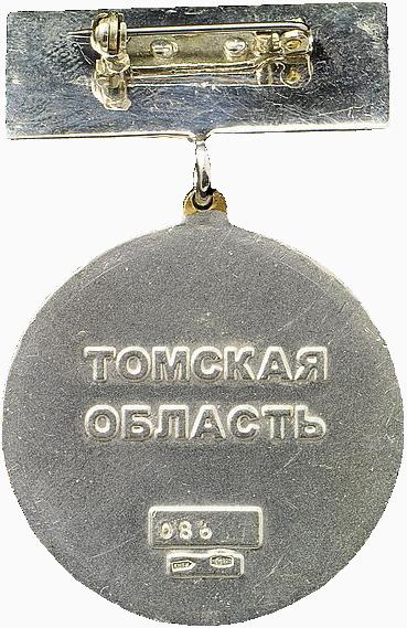 Собственная доработка